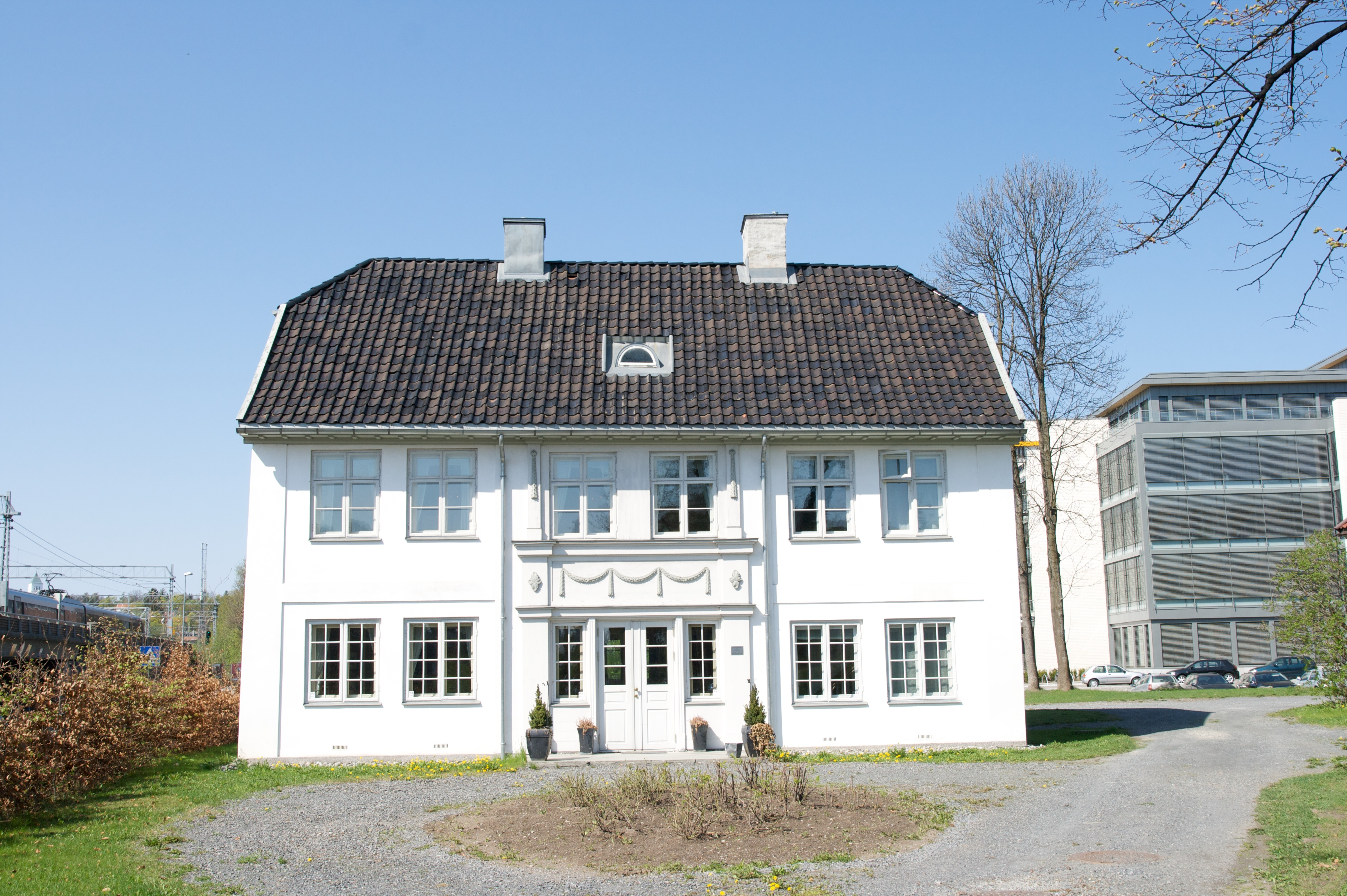 Løkken Sofienlund. Drammensveien 155 på Skøyen i Oslo.